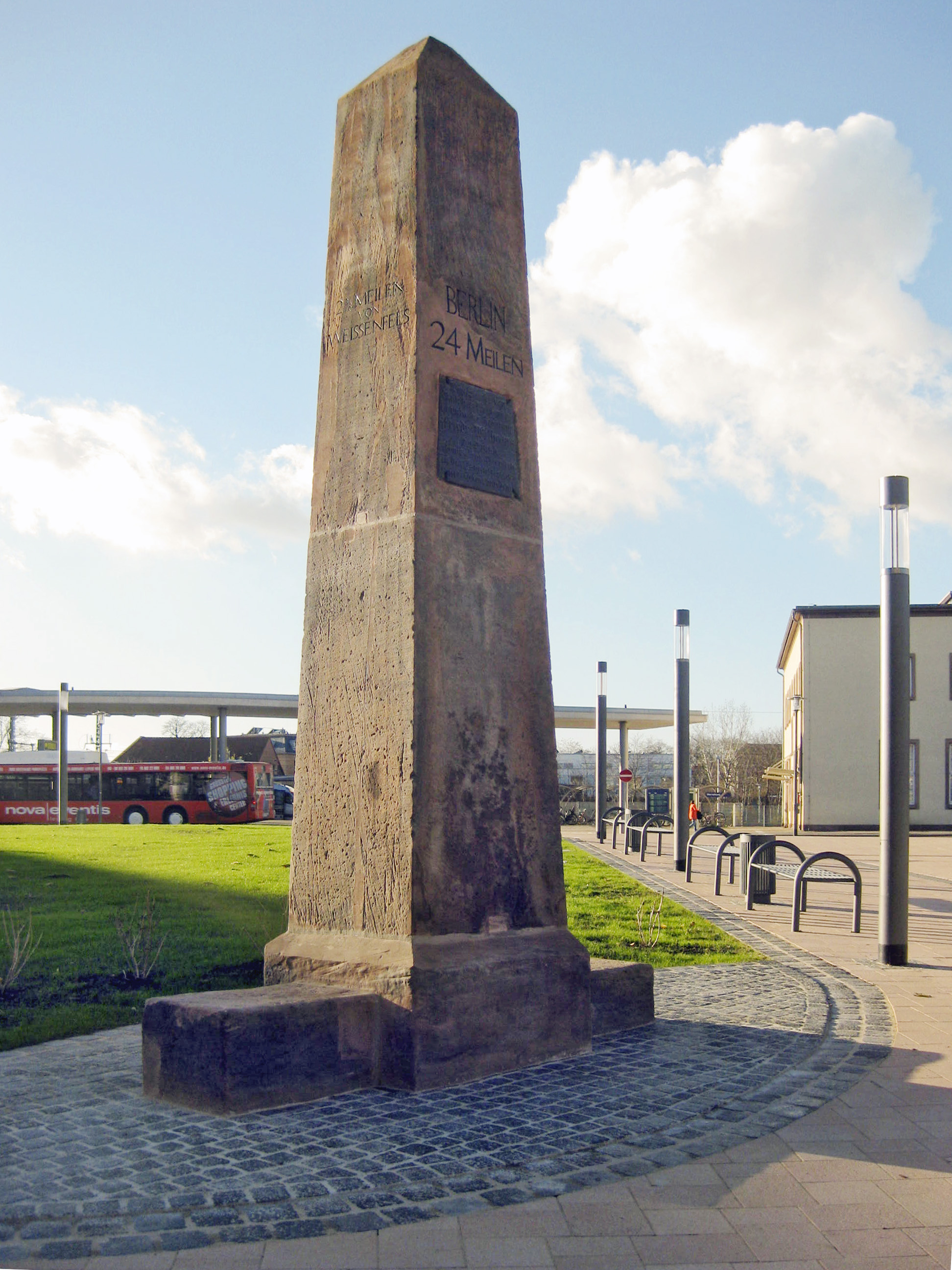 Preussischer Ganzmeilenobelisk in Merseburg am neuen Standort